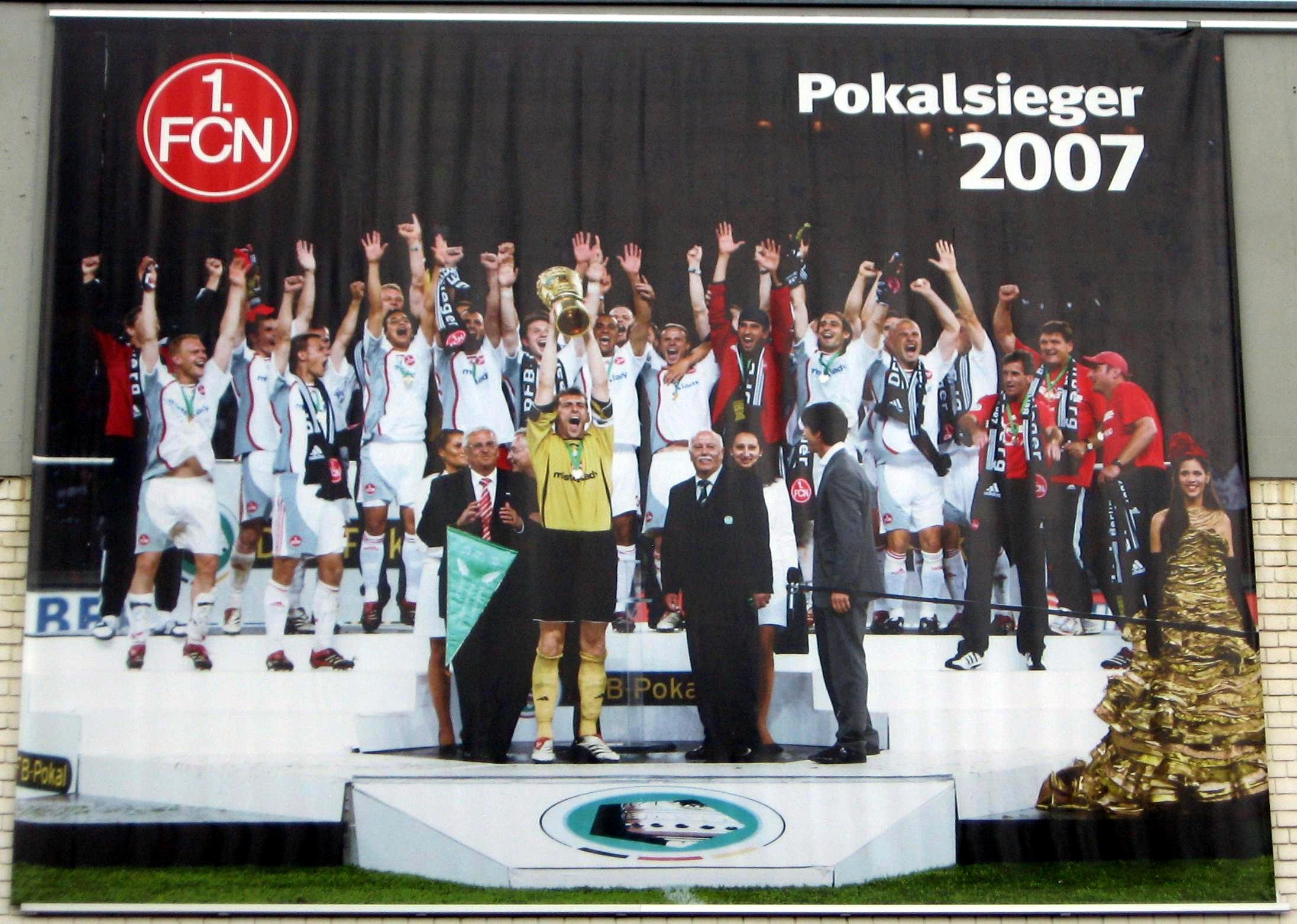 Flag of 1. FC Nürnberg at the Valznerweiher, Nürnberg.